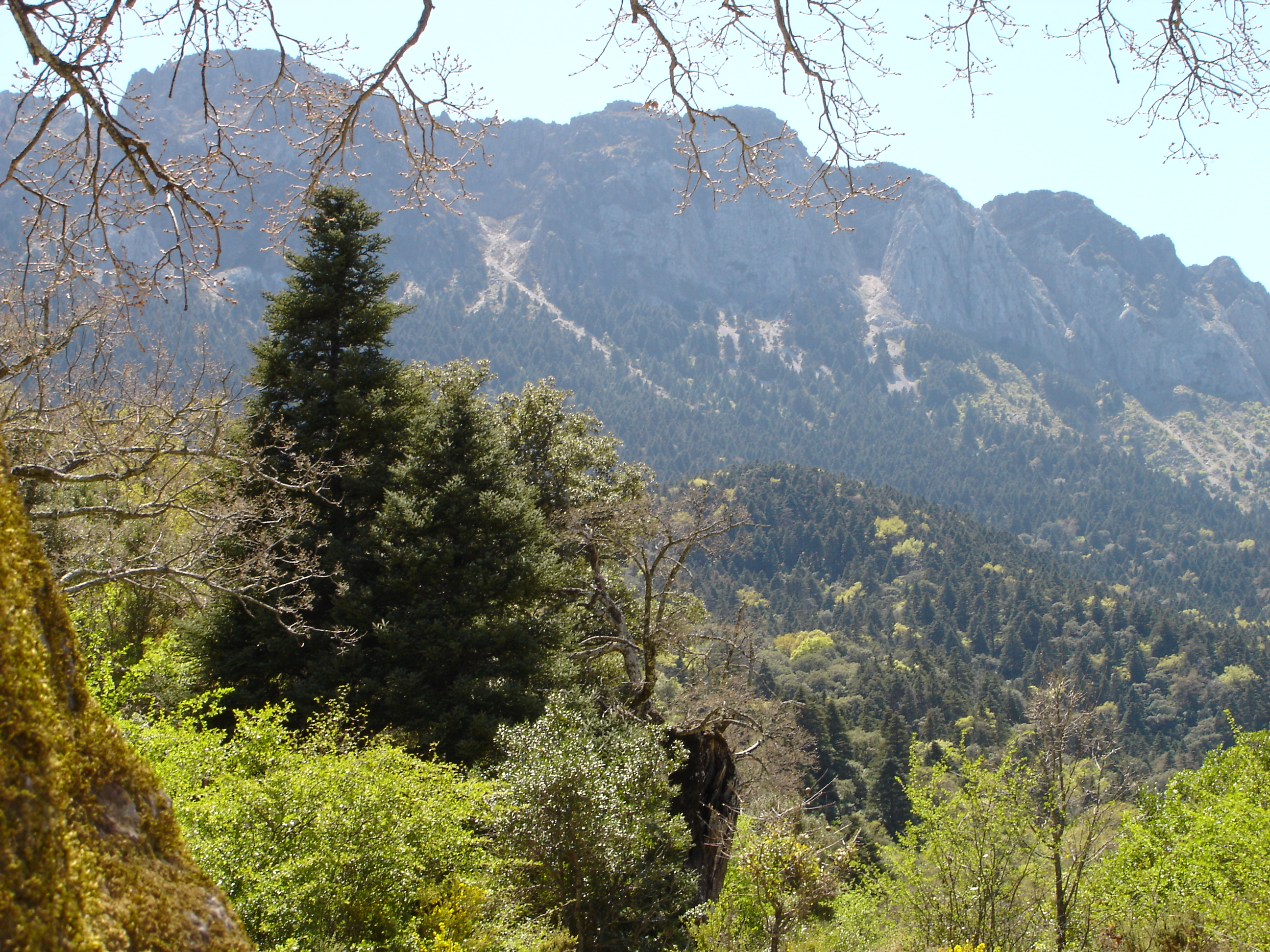 Sierra del Pinar o Pinsapar de Grazalema, (Cádiz), España